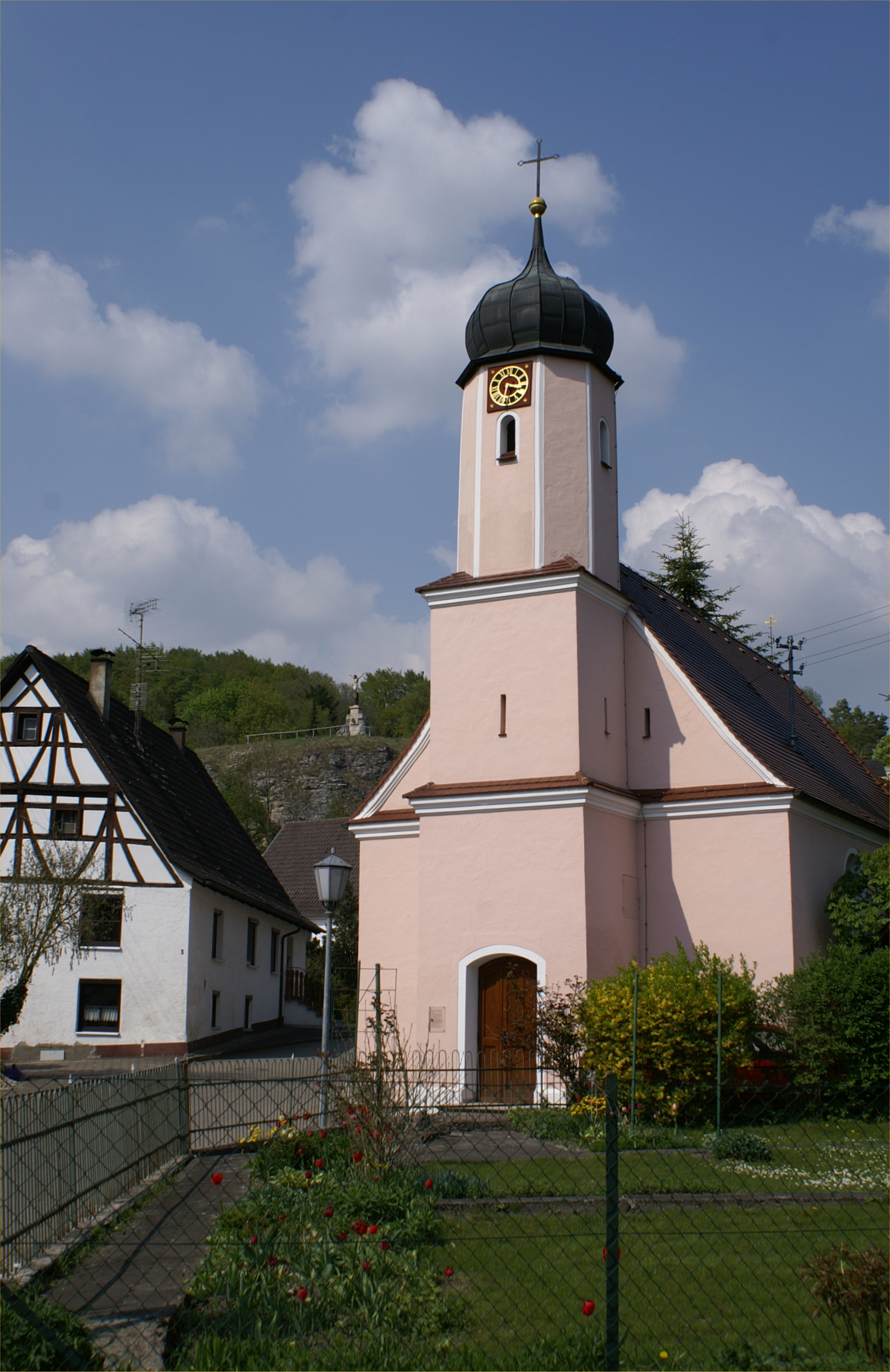 Die Kapelle Maria Himmelfahrt in Lauterach. Auf dem Berg im Hintergrund steht das Saarburger Kreuz.